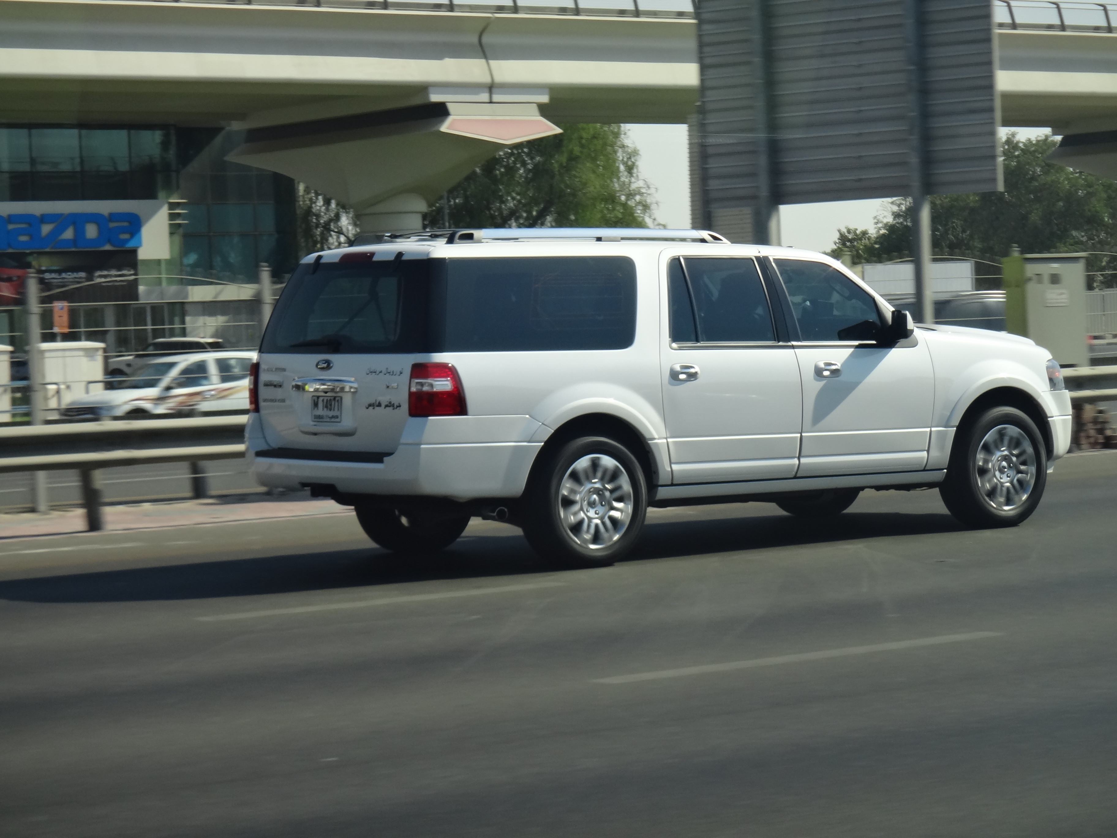 Dubai, UAE.